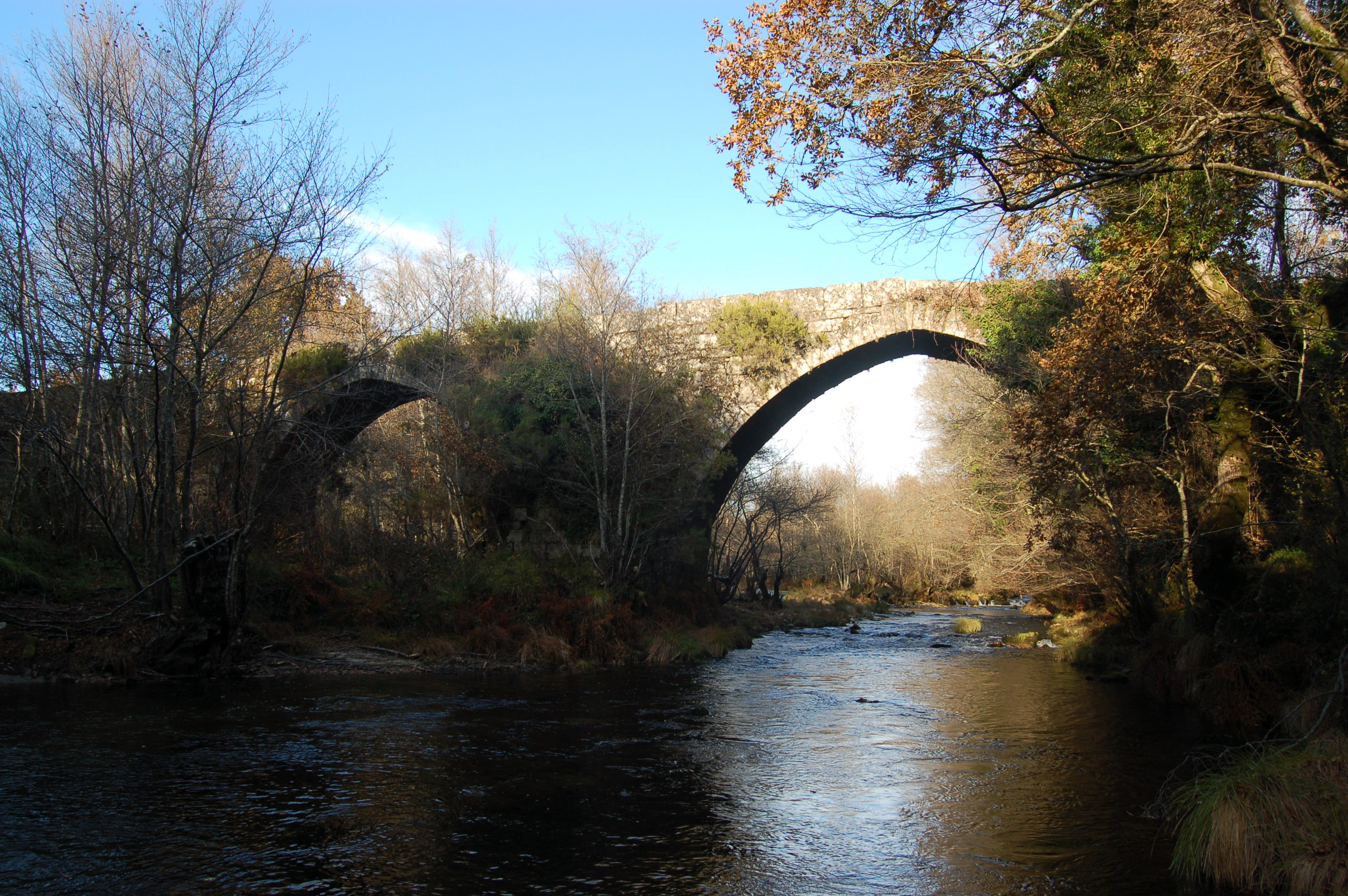 Ponte romana sobre o río Lérez en Pedre, Cerdedo